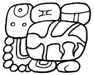 Majų glifas, simbolizuojantis miestą Qirigua. Padarytas naudojant freeware Maya font.